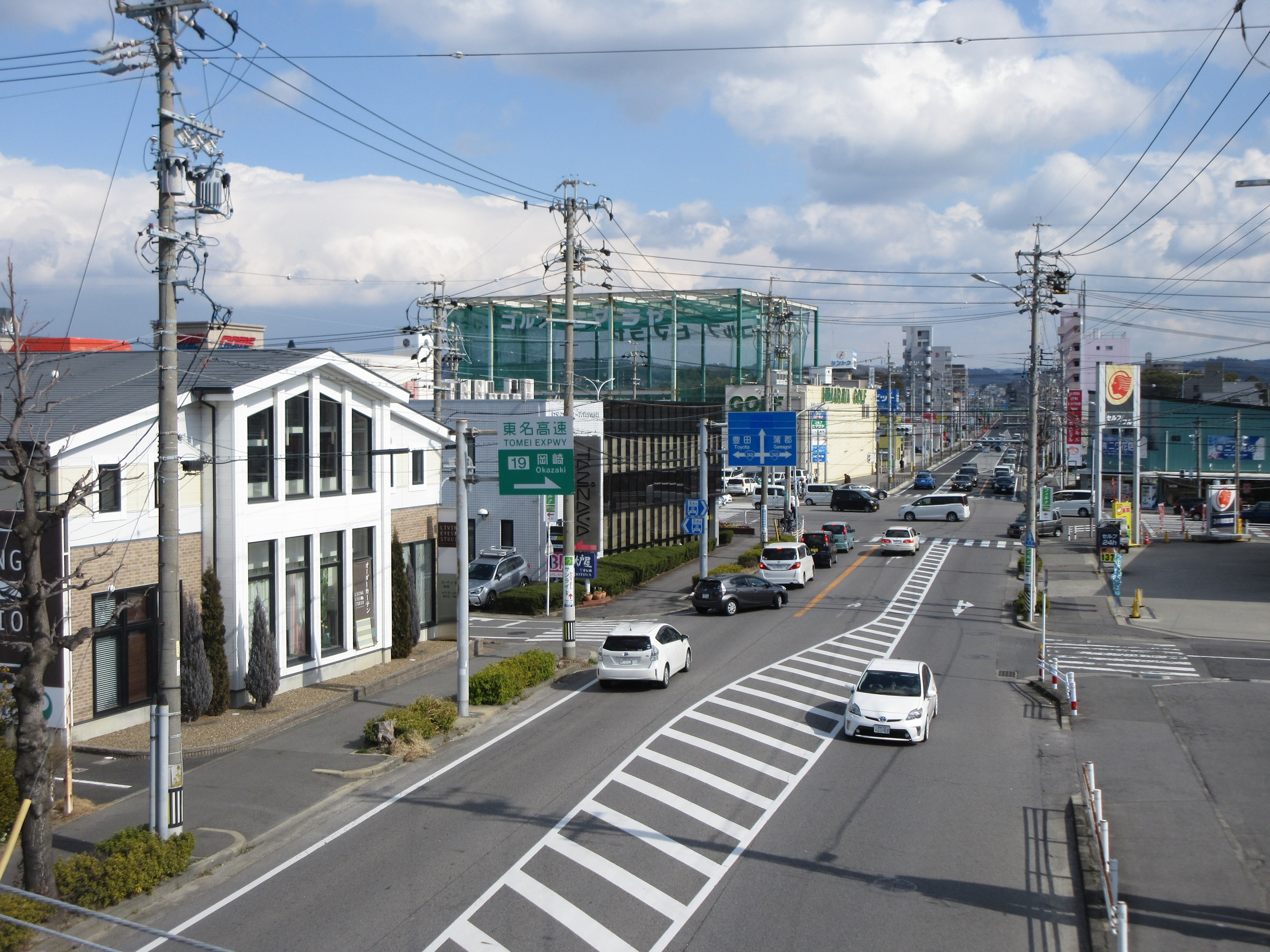 愛知県道56号名古屋岡崎線（岡崎市井田西町の付近）